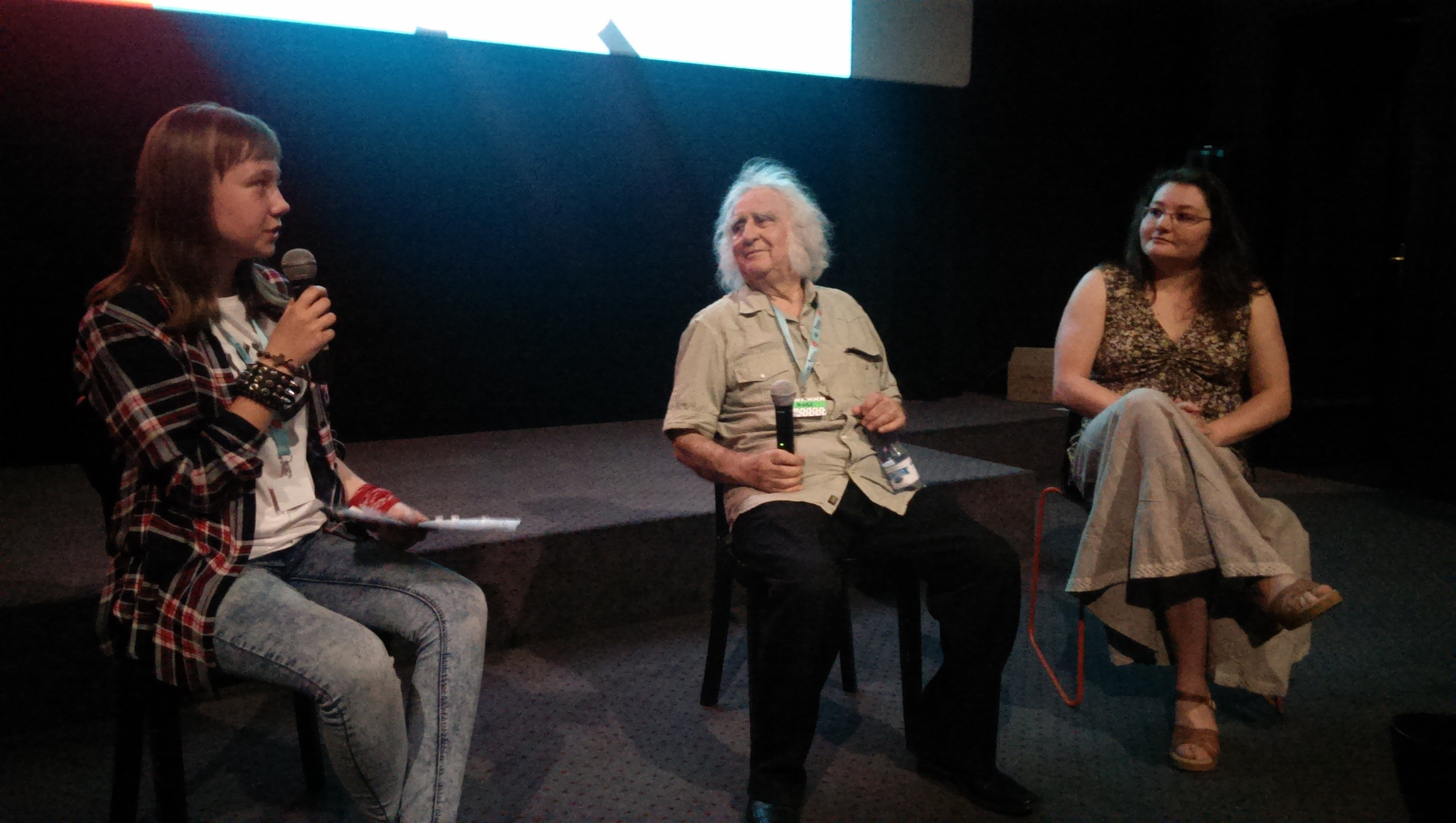 Wywiad ze Stanisławem Jędryką przed projekcją filmu "Podróż za jeden uśmiech" w trakcie festiwalu "Kino w trampkach".